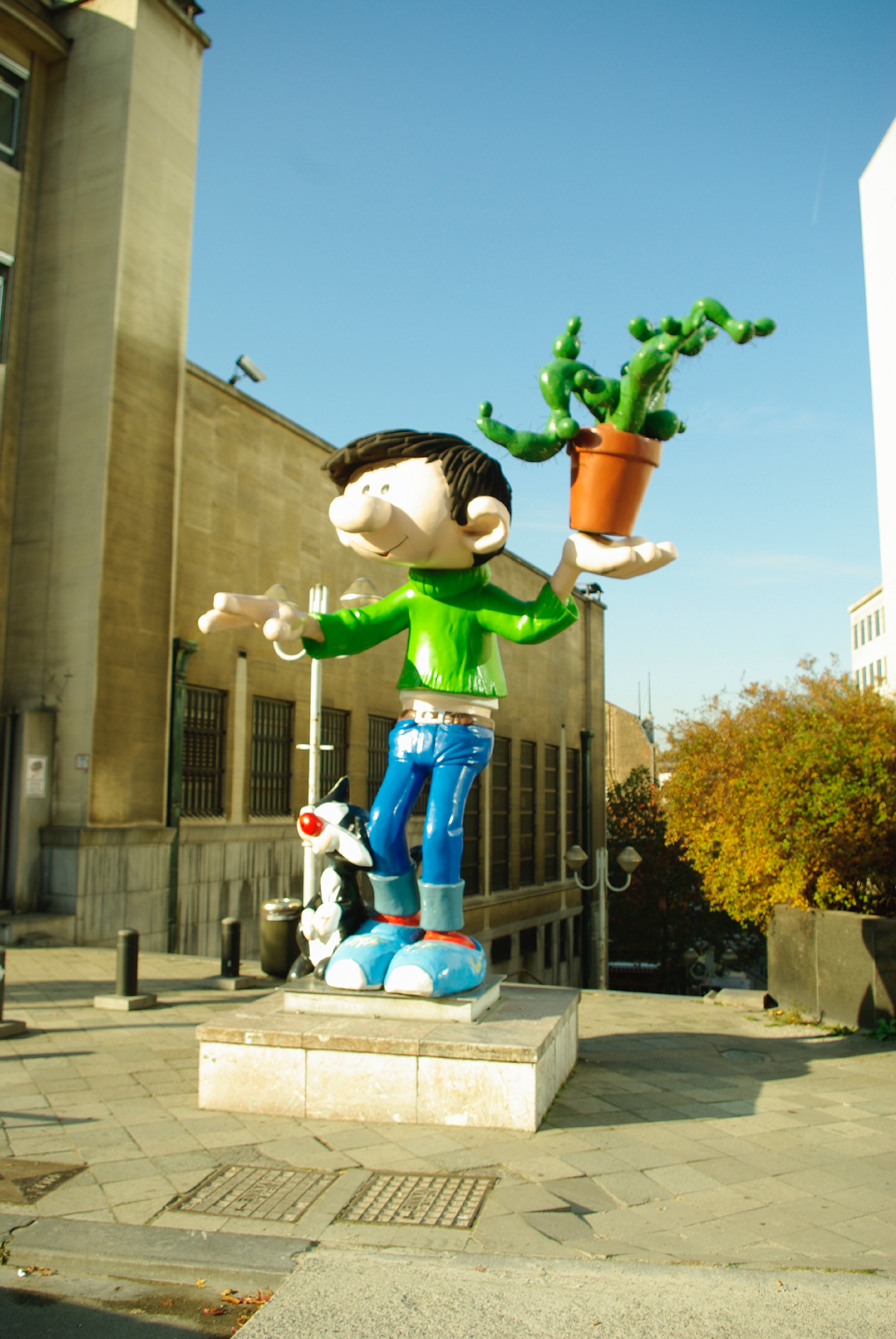 Gaston qui vous lance une invitation à visiter le centre belge de la bande-dessinée, à l'intersection de la rue des Sables et des boulevards Berlaimont et Pachecolaan à Bruxelles.